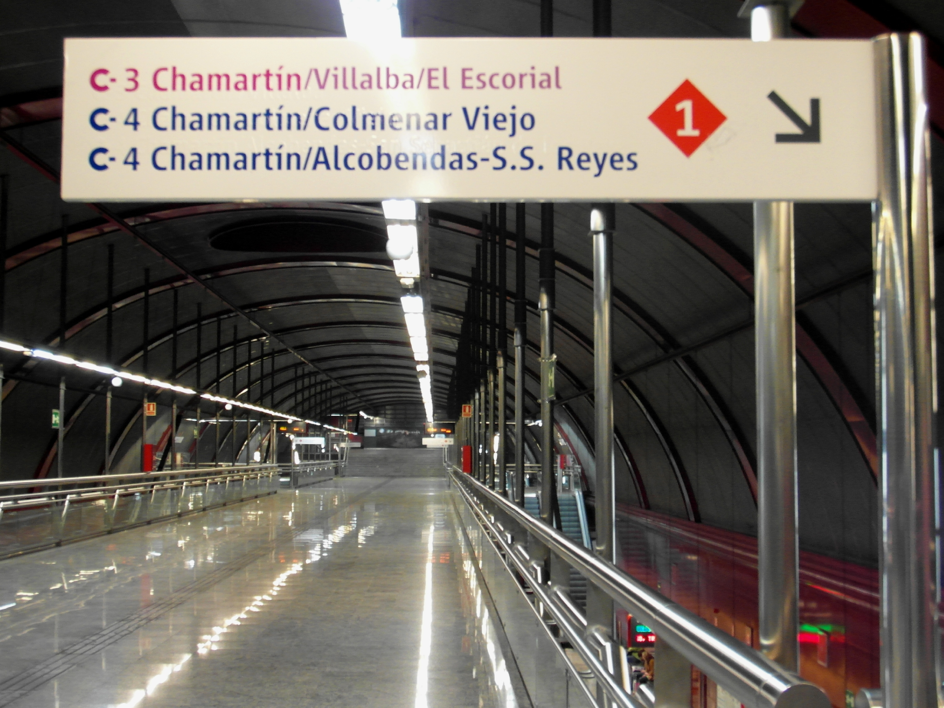 Estación de Sol, Cercanías Madrid.